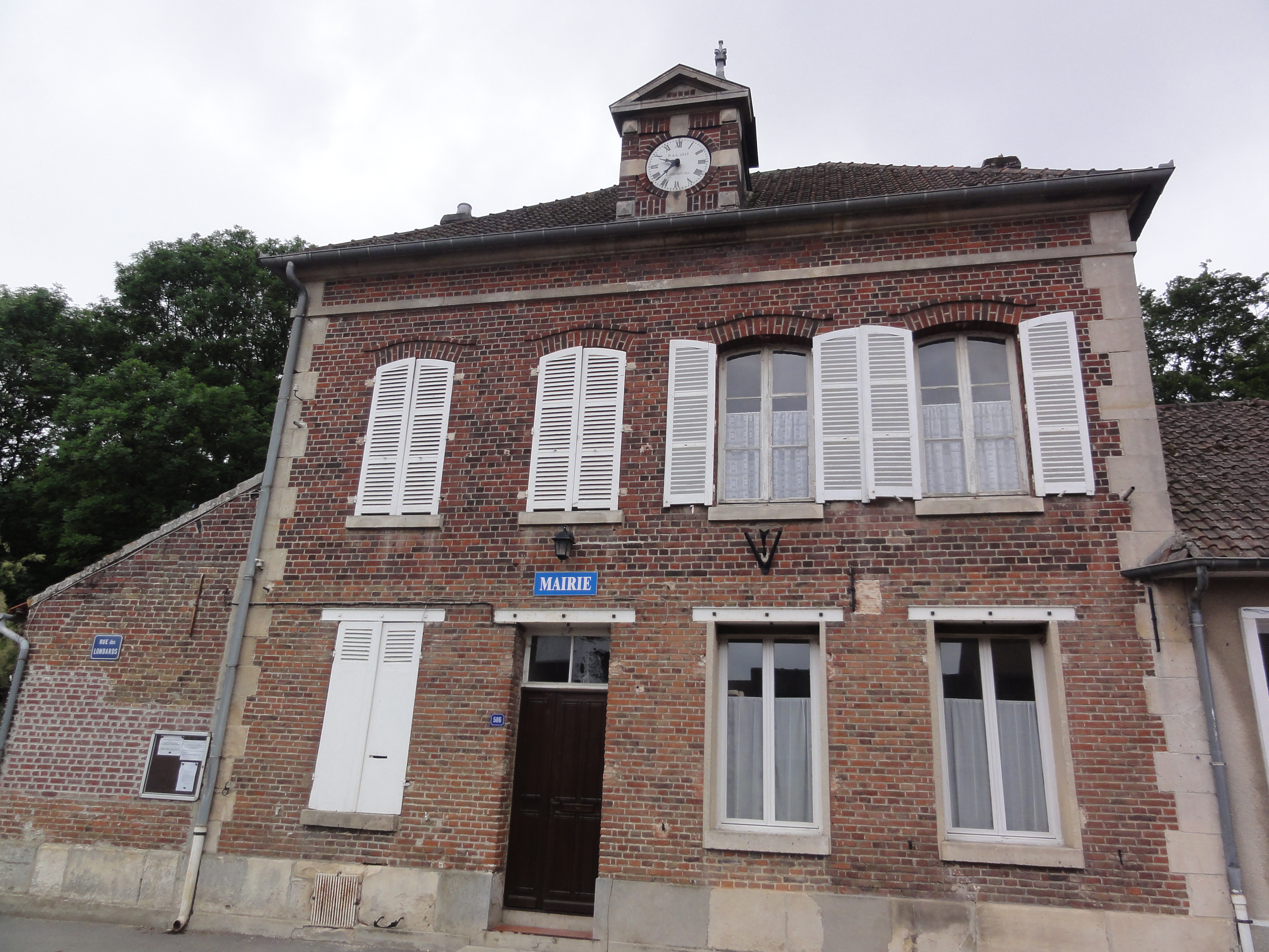 Le Fayel (Oise), la mairie.